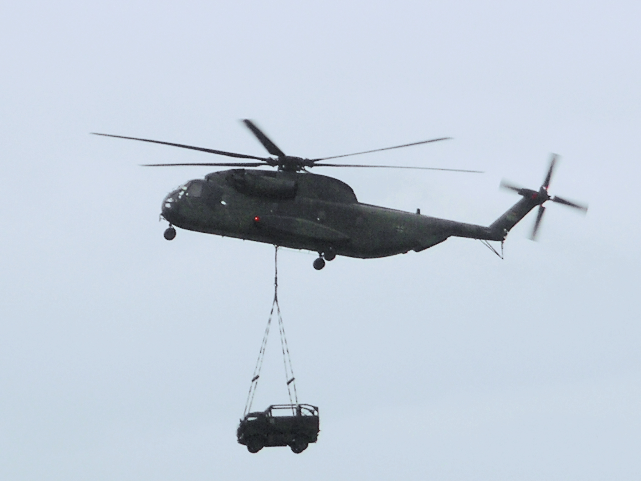 Bearbeitung von Bild:Mungo-Außenlast.jpg.